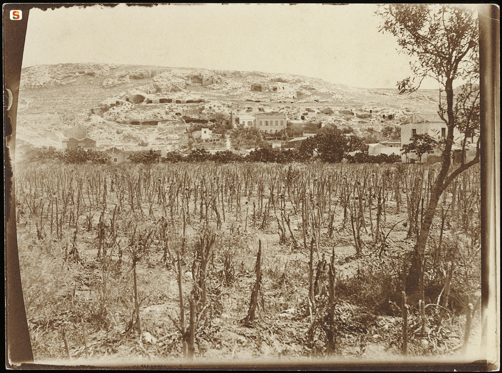 sant'Avendrace vecchia.